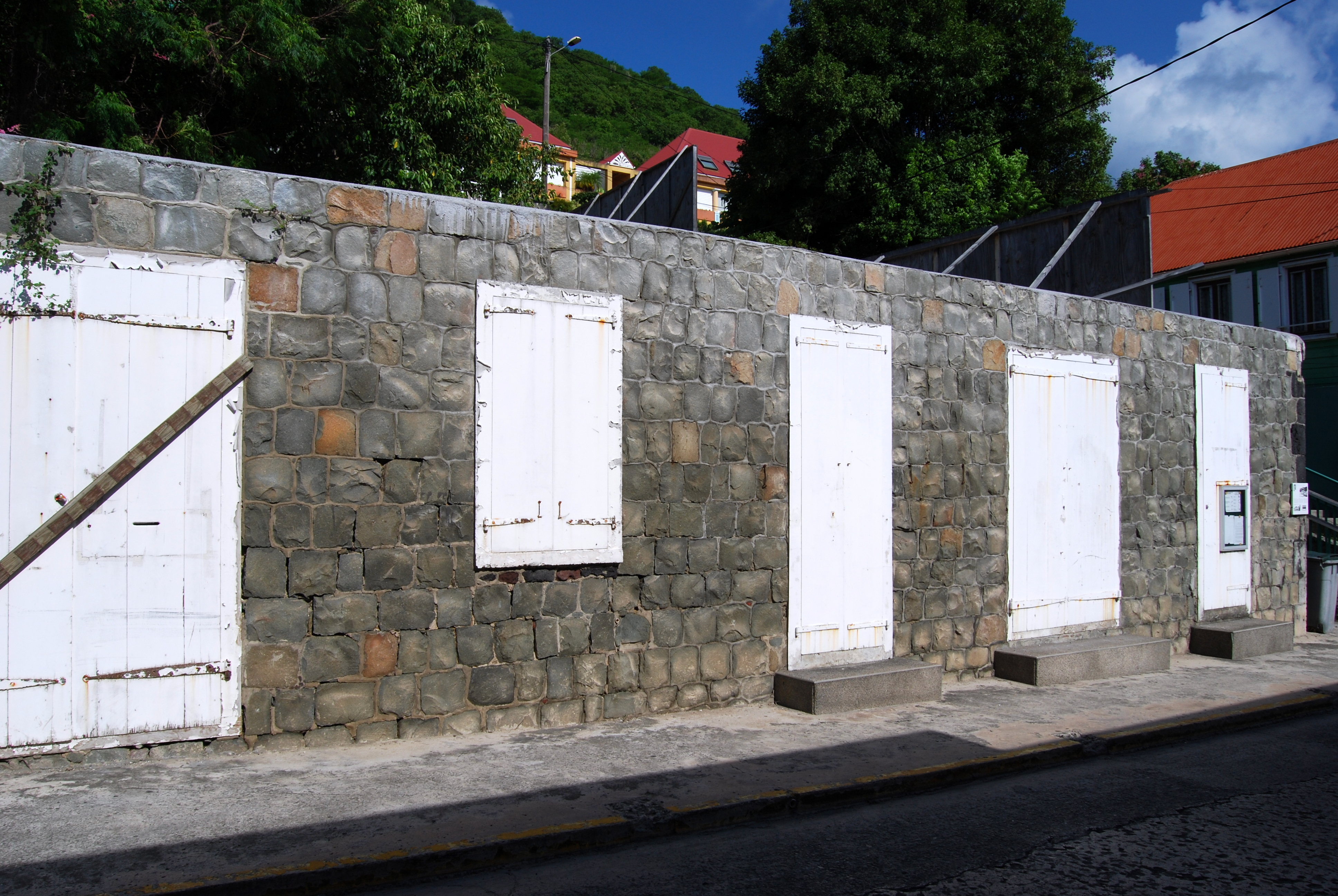 Maison des Gouverneurs (ancien hôtel de ville de Gustavia), Rue August Nyman, Gustavia (inscrit, 1995)